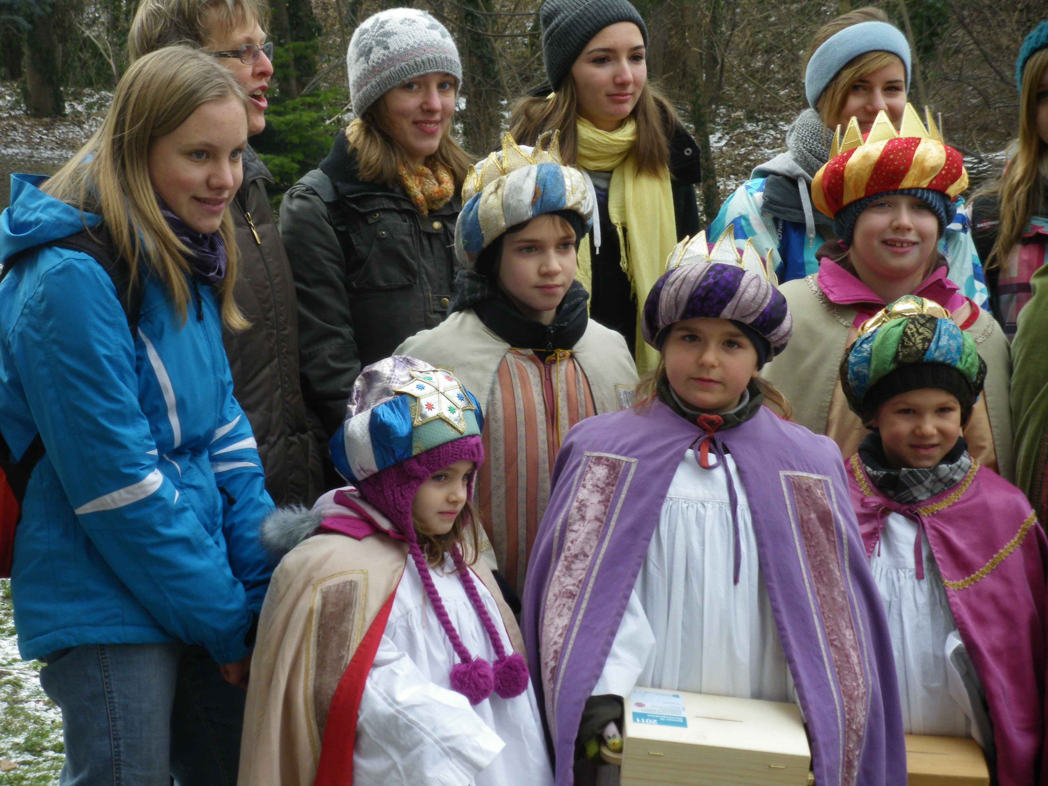 Sternsinger der Pfarre St. Nokolaus in Inzersdorf im Rahmen der Dreikönigsaktion